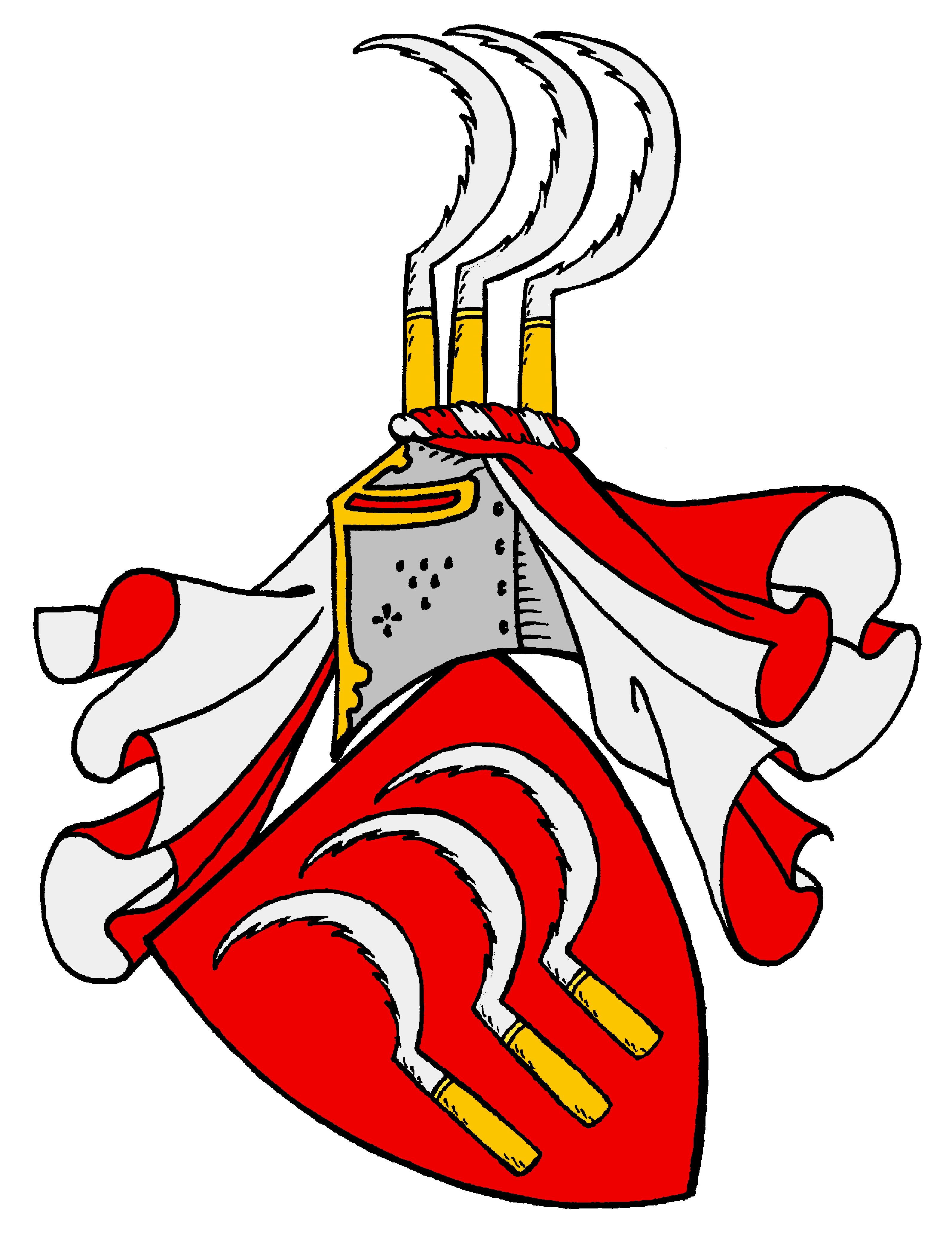 Stammwappen der Wagen (von Wagensperg), einem alten Adelsgeschlecht des Herzogtums Kärnten: In Rot drei silberne Sicheln nebeneinander, mit den gezackten Schärfen rechtsgewendet und goldenen Griffen. Auf dem Helm mit rot-silbernen Decken die Sicheln wie beschrieben. [1]